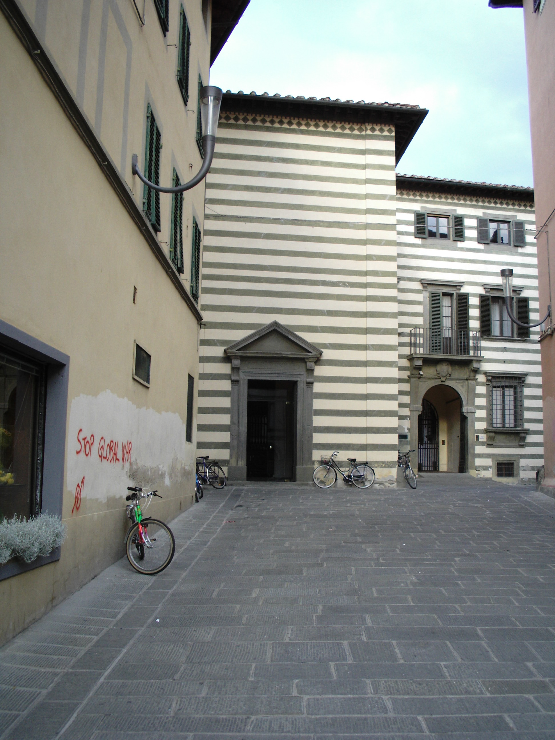 Empoli entrata Museo della collegiata